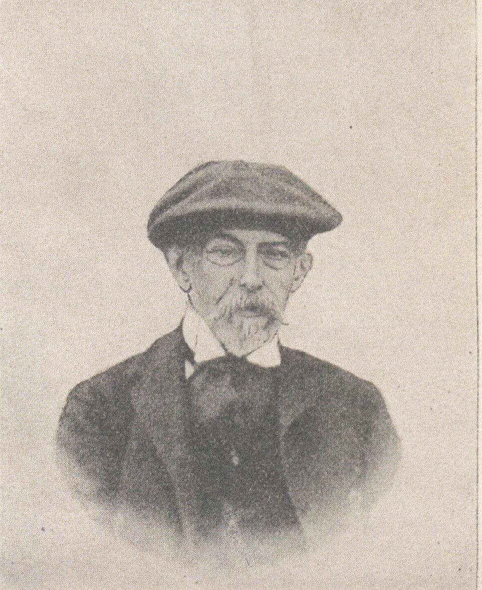 Cliché datant du XIXe siècle de l'historien Eugène Caïs de Pierlas.